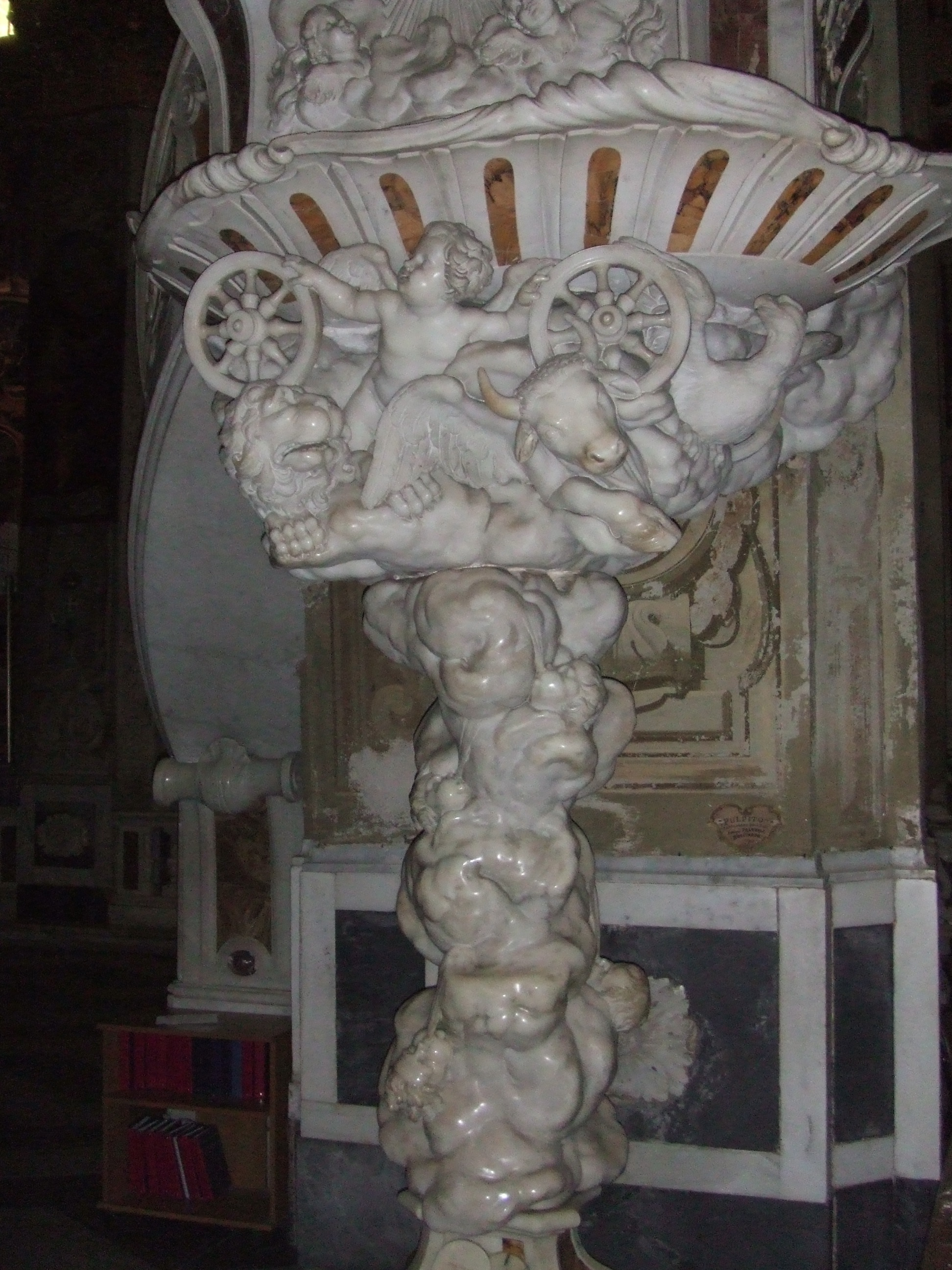 Chaire de marbre de la collégiale San Biagio (Finalborgo)